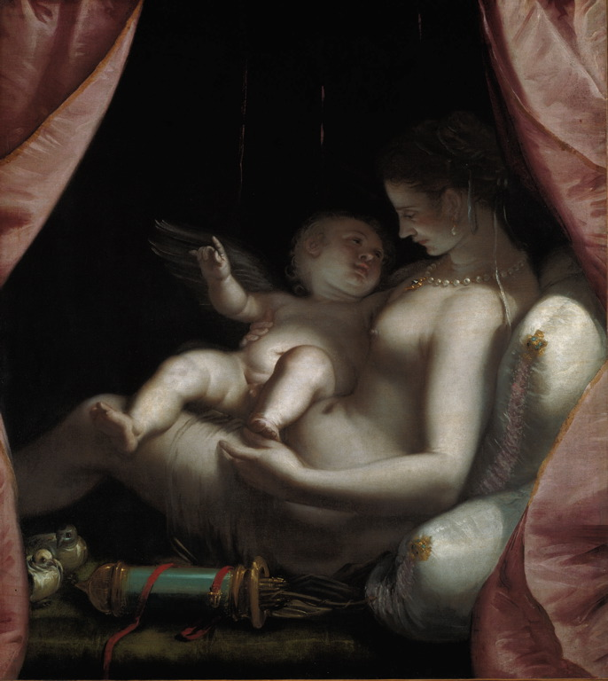 Venus and Cupidlabel QS:Les,"Venus y Cupido" label QS:Len,"Venus and Cupid"